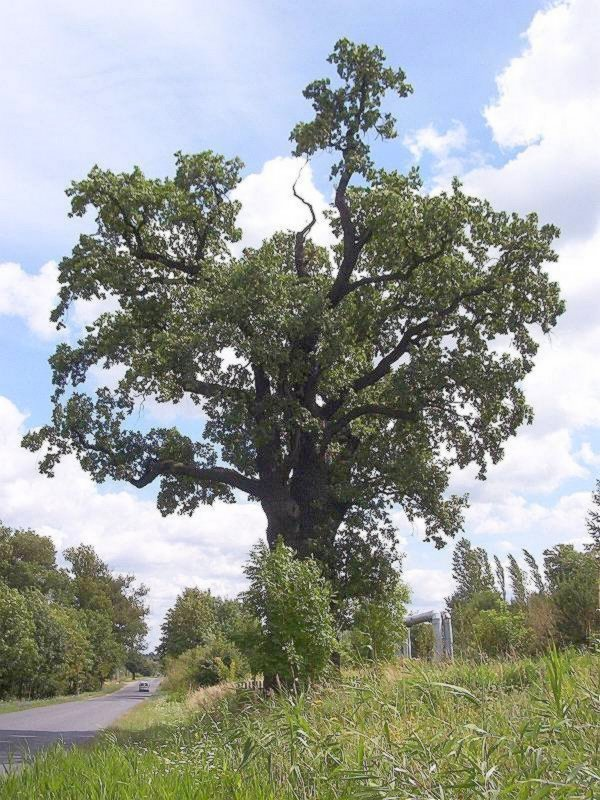 Dąb Bartek w Bydgoszczy - pomnik przyrody i najstarsze drzewo w mieście. Wiek 500 lat, obwód w pierśnicy 625 cm